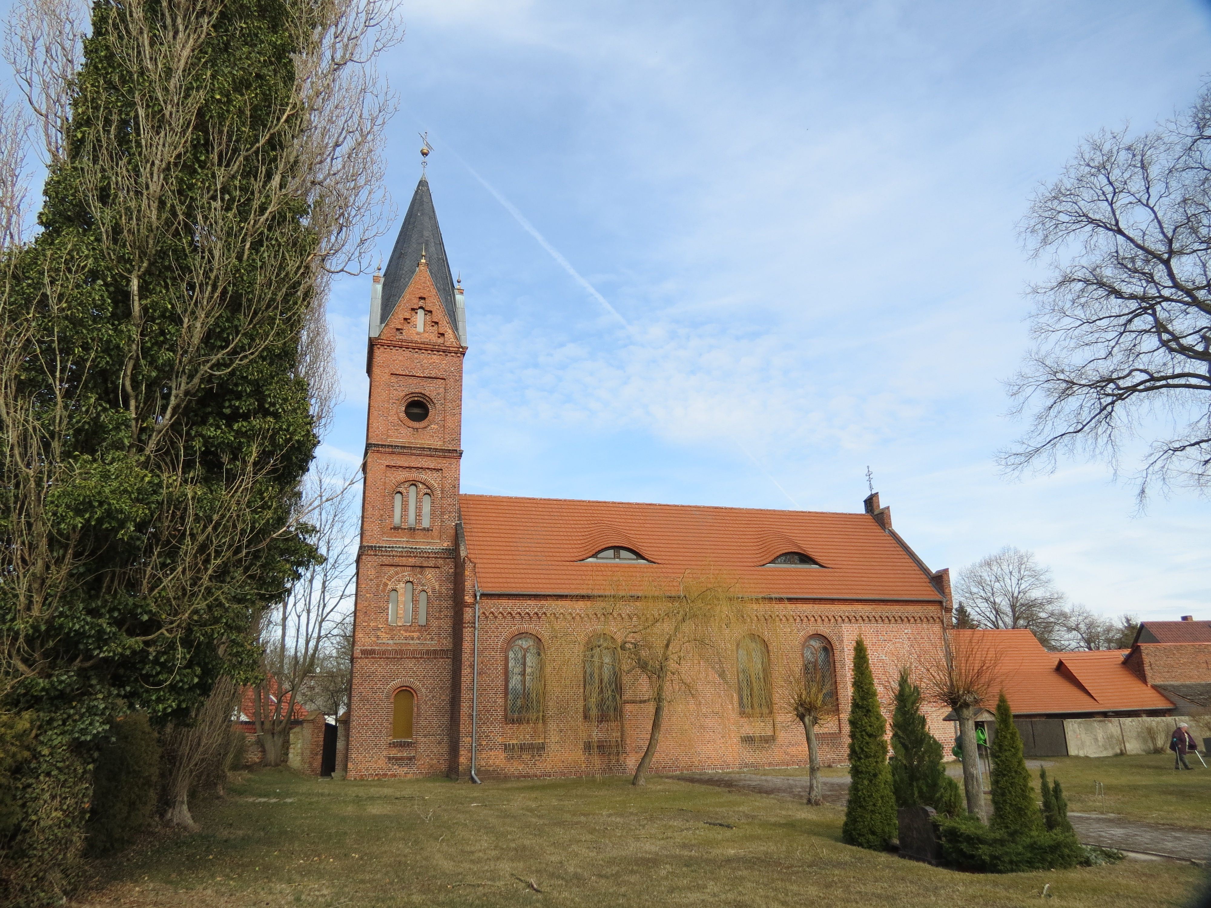 Dorfkirche Pretschen, Südseite, Pretschen, Gemeinde Märkische Heide, Lkr. Oder-Spree, Brandenburg, Deutschland.